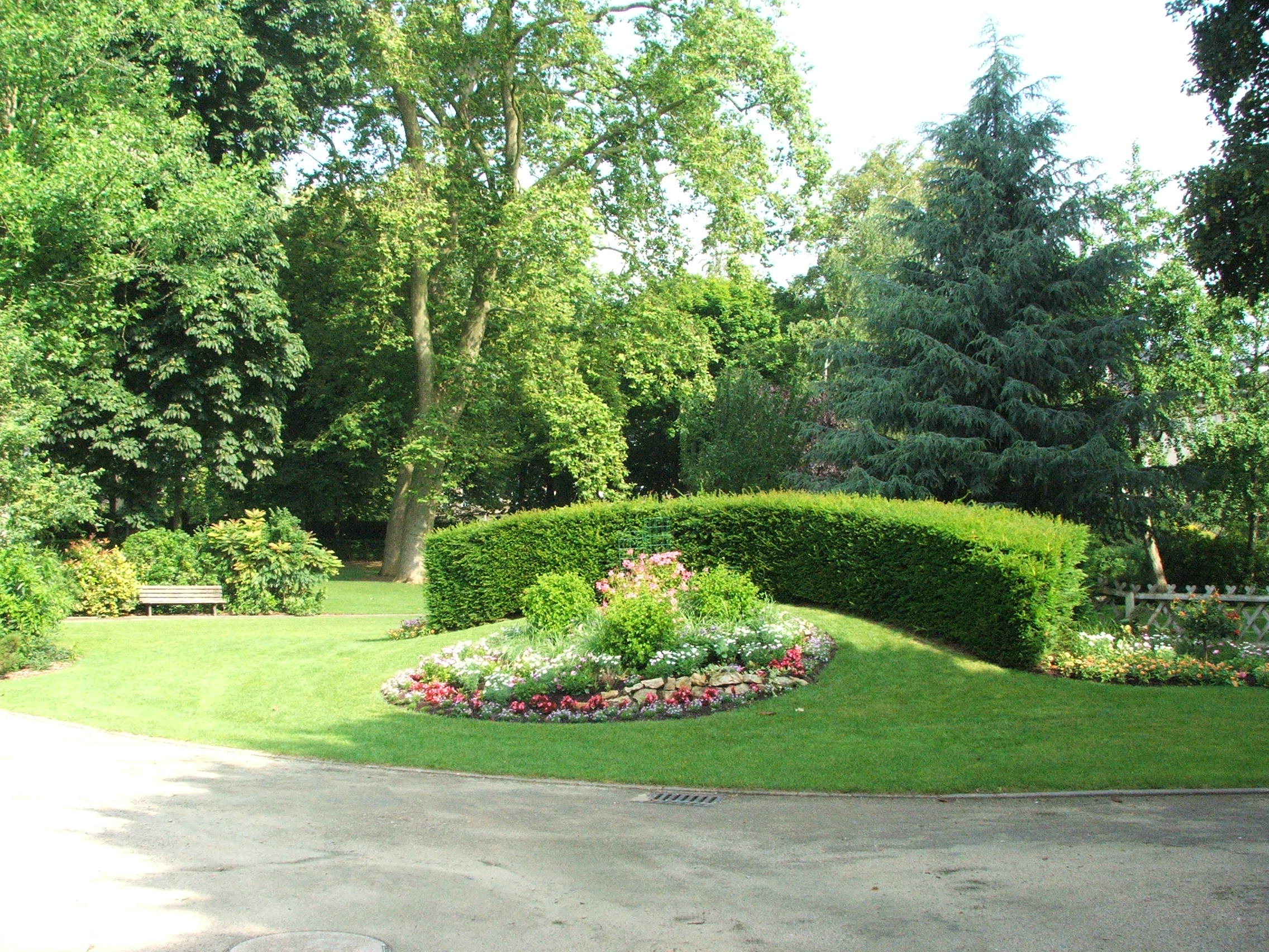 Le Parc Victor Hugo du Mans, situé rue Chanzy, non loin de l'inspection académique.